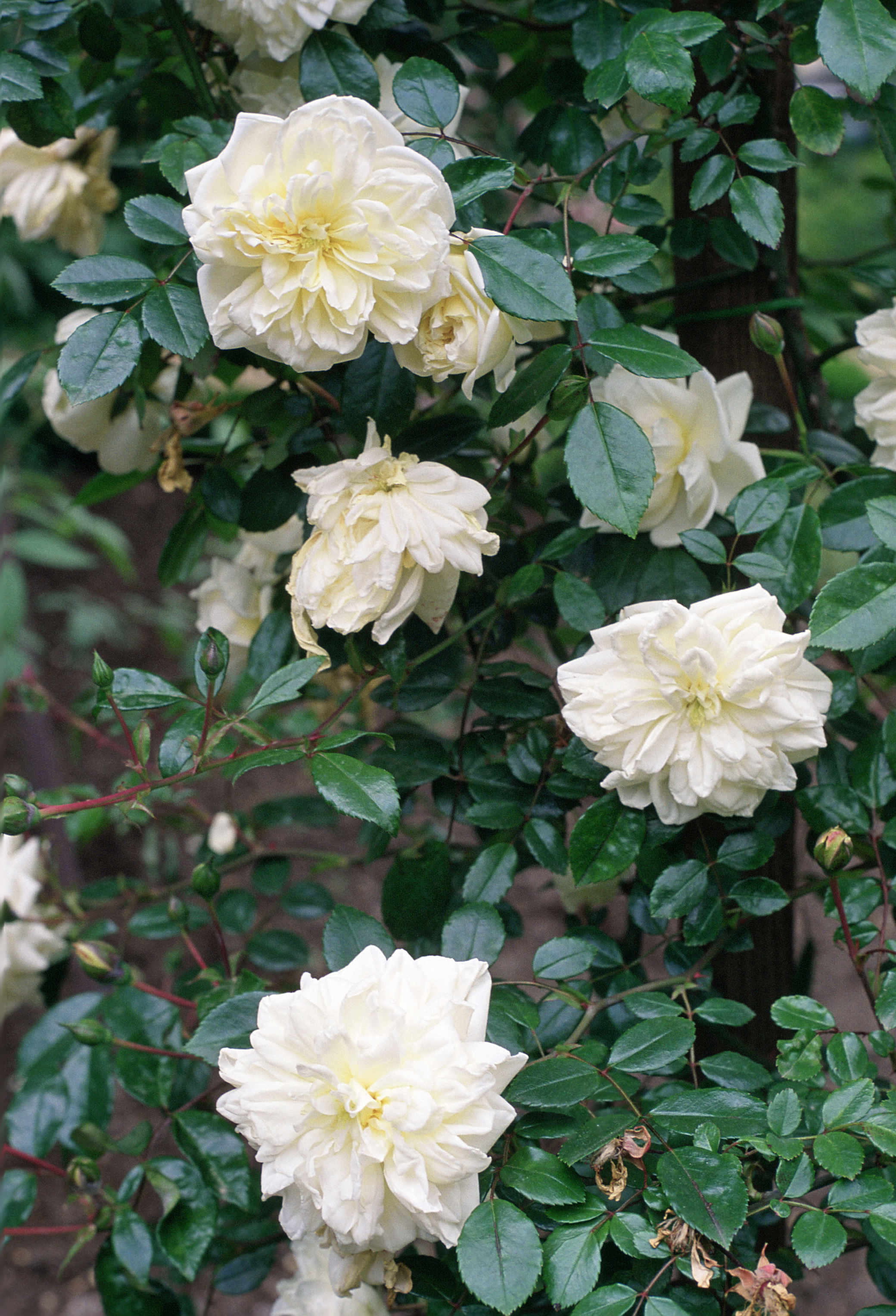 Rosa 'Albéric Barbier', hybr. Wichuraiana, sect. Synstylae. Real Jardín Botánico de Madrid.